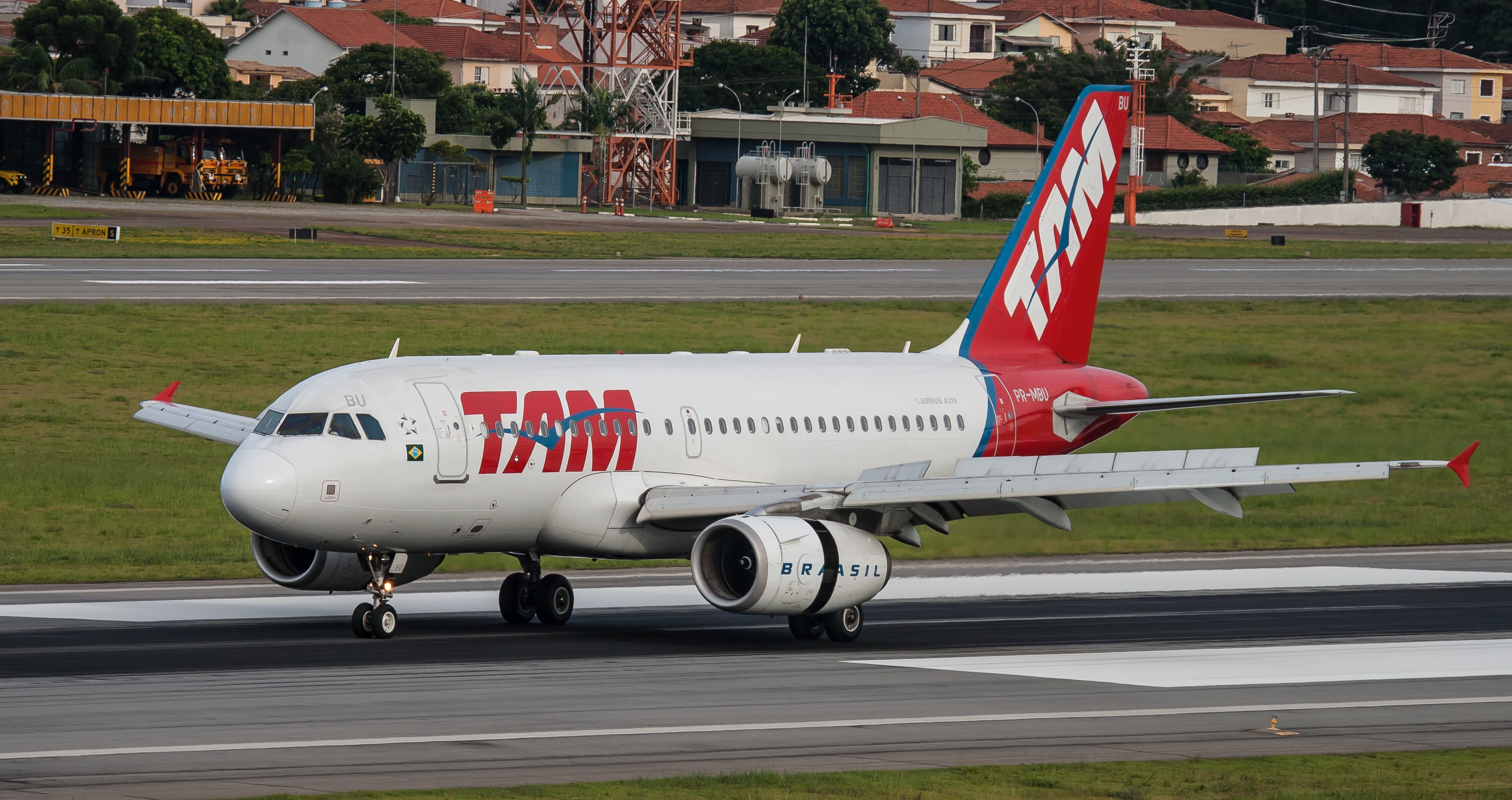 Airbus A319